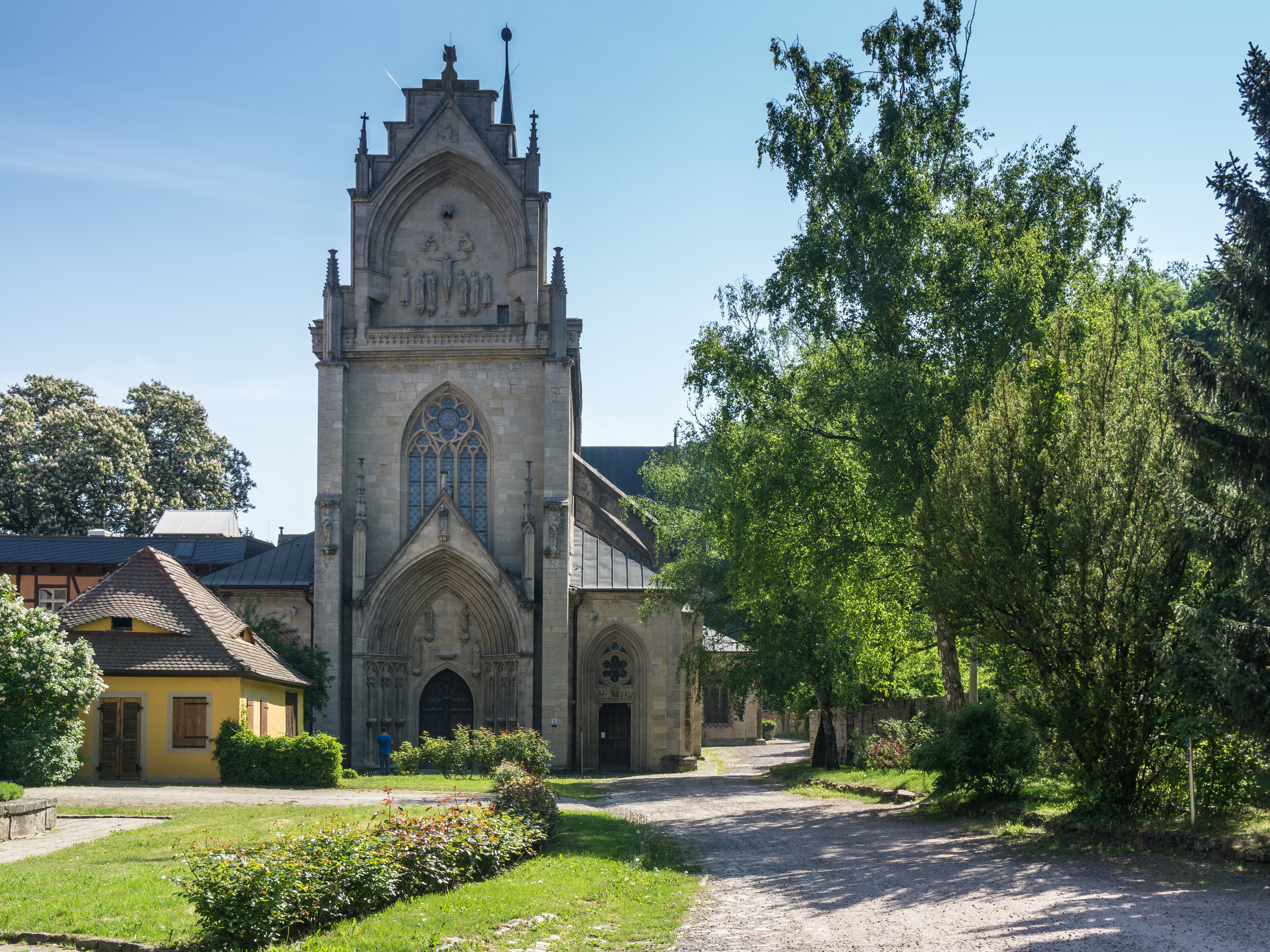 Westfassade der Klosterkirche Schulpforte, in Naumburg OT Schulpforte